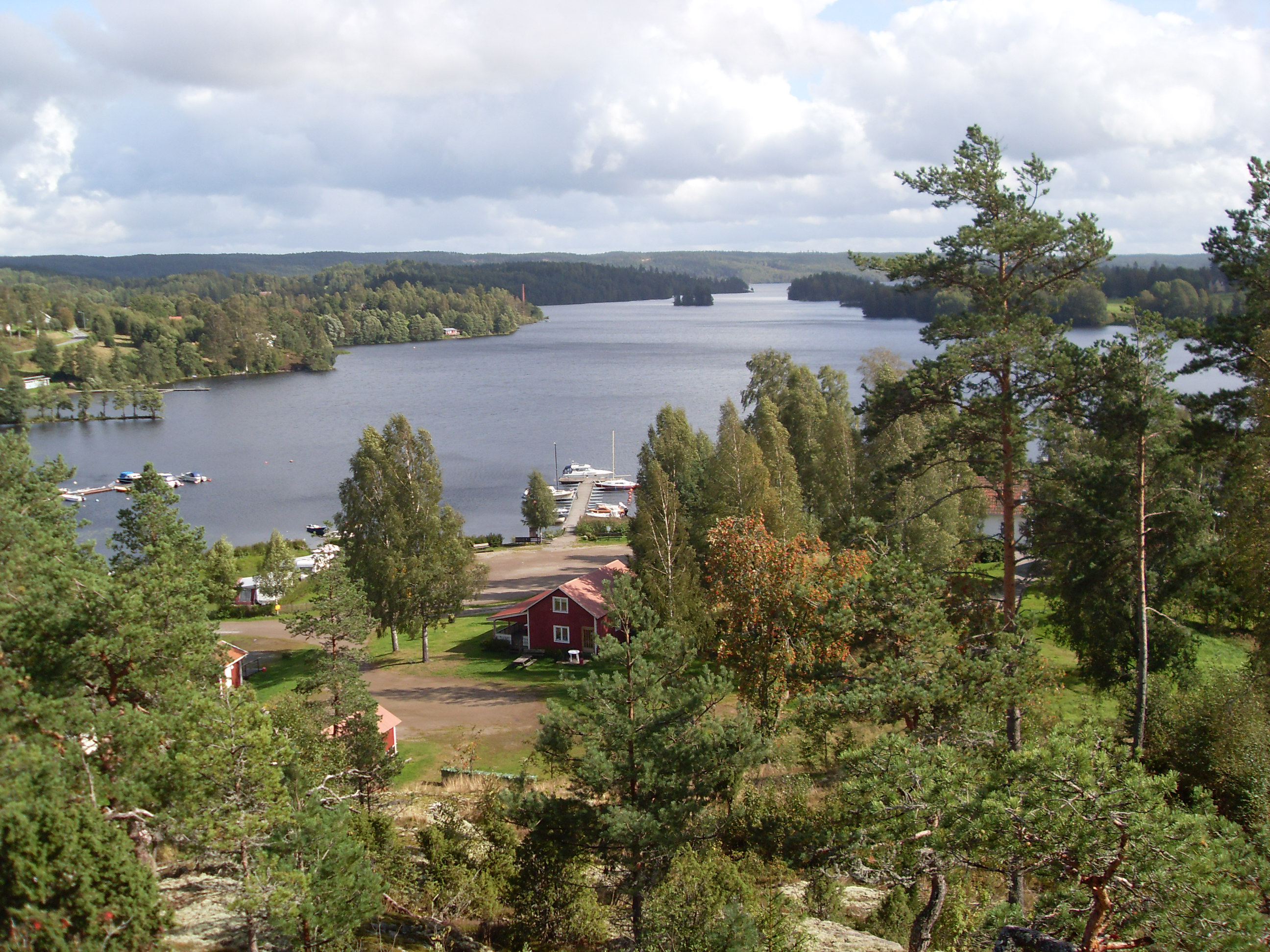 Nössemark in Sweden. Original description: Blick in die langgestreckte Bucht von Nössemark